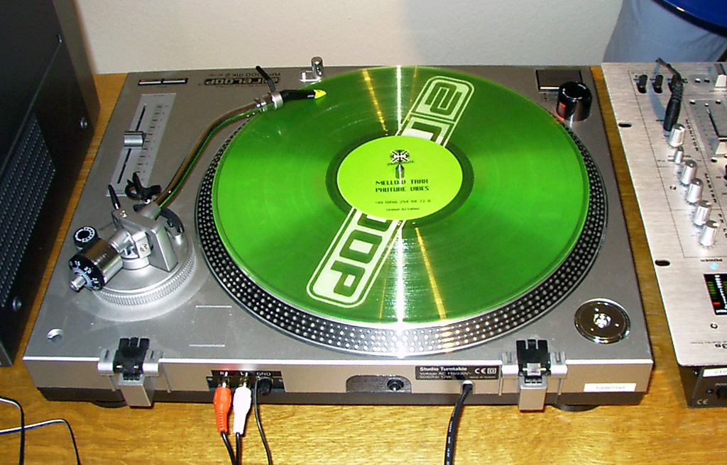 Gruene transparente single